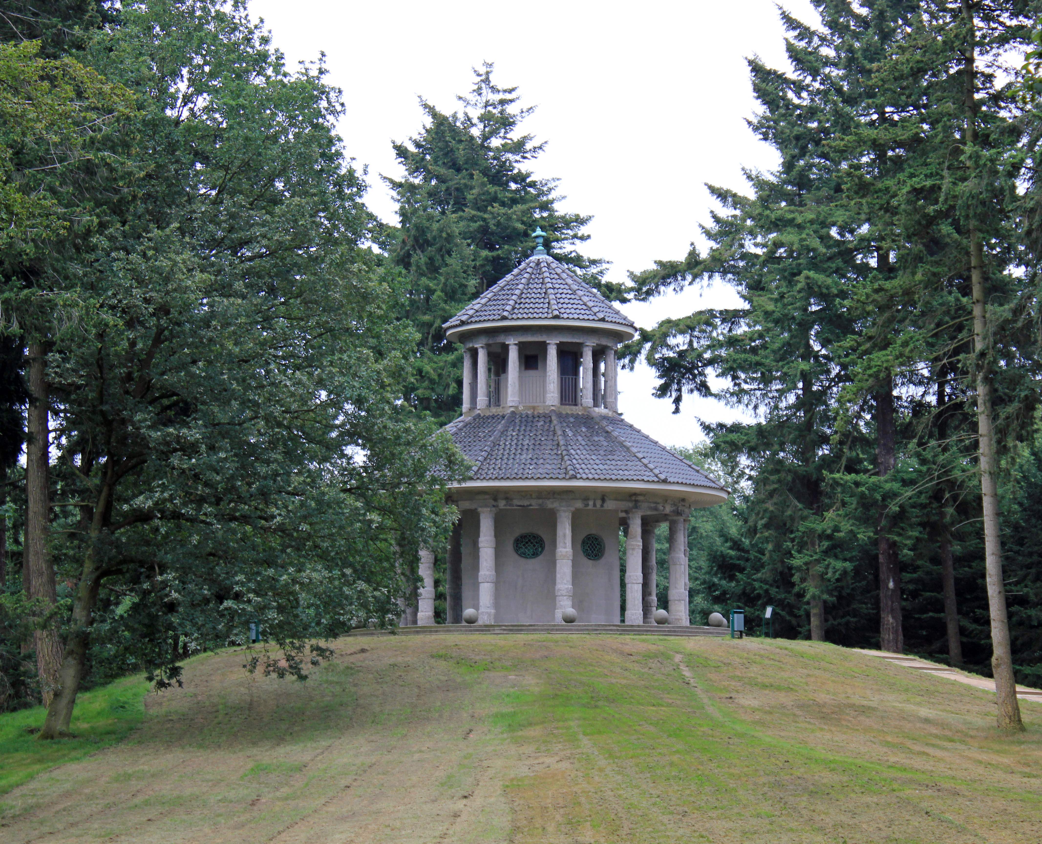 Gabriel von Seidl lieferte die Entwürfe für den Aussichtsturm auf dem Hügel am Kleinen Stadtwaldsee im Bürgerpark in Bremen und ließ einen turmartigen Pavillon mit Säulenumgang errichten, hinter dessen Eichenholztür eine Treppe auf die obere Plattform führte. Ab Herbst 1909 diente das Bauwerk so als Aussichtspunkt und Regenunterstand, wurde aber gleich darauf bis Sommer 1910 wieder geschlossen, da die Aussicht auf den gerade neugestalteten Park als noch zu unschön angesehen wurde. Im Volksmund bürgerte sich bald nach der Fertigstellung aus nicht näher bekannten Gründen die Bezeichnung „Judentempel“ ein. s.a.: Herbert Schwarzwälder: Das Große Bremen-Lexikon. Edition Temmen, Bremen, 2003 Das abgebildete Objekt ist ein geschütztes Kulturdenkmal in der Freien Hansestadt Bremen, mit der Nr. 0218,T040 beim Landesamt für Denkmalpflege registriert.